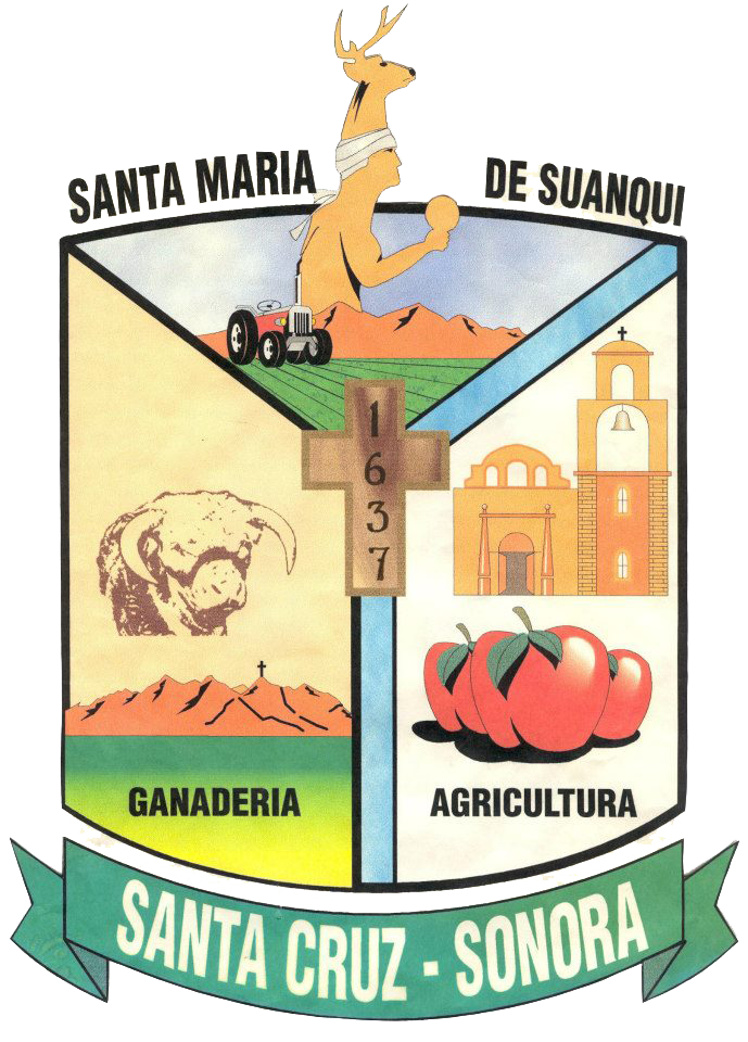 Escudo del municipio sonorense.